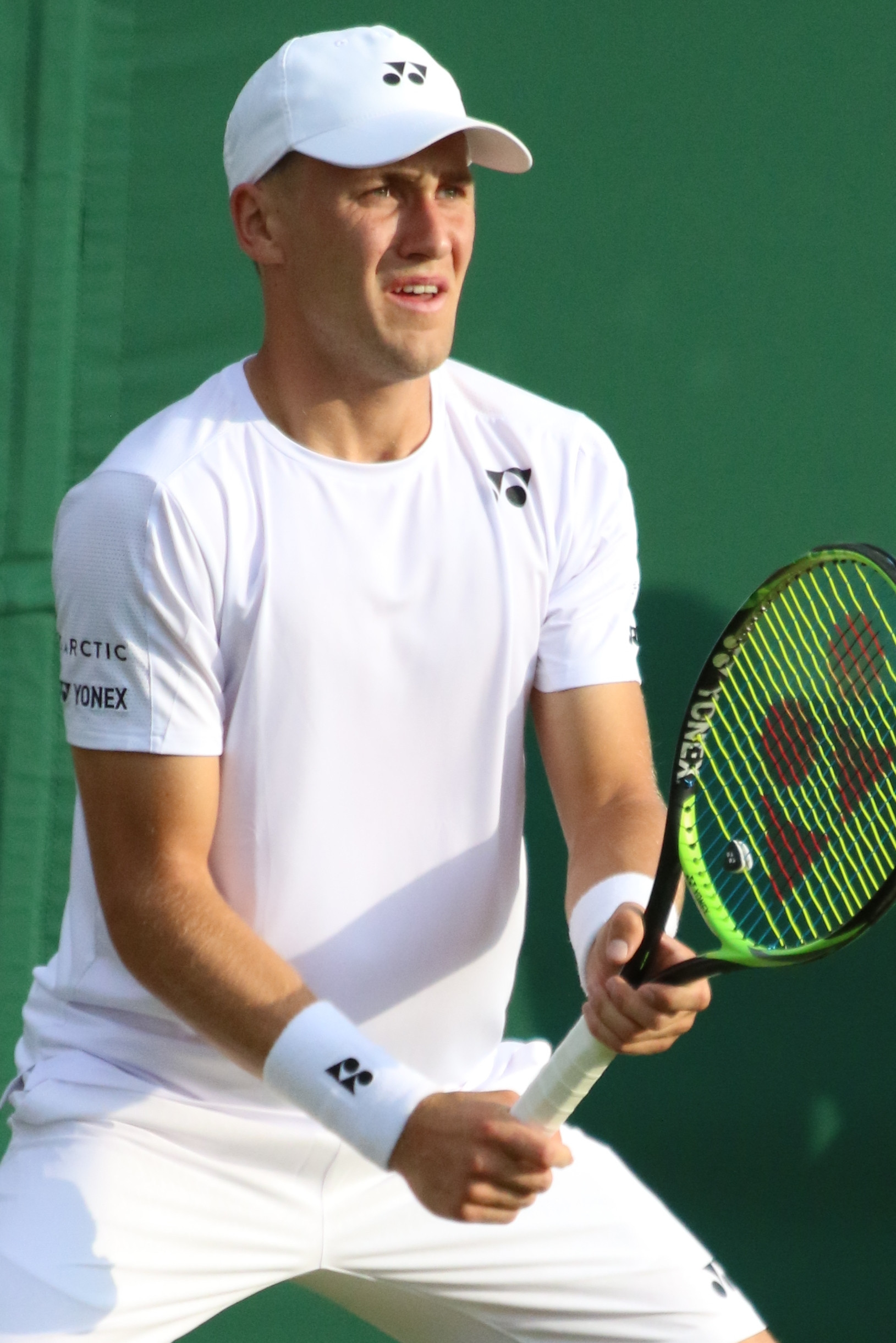 Ruud WM19 (7)